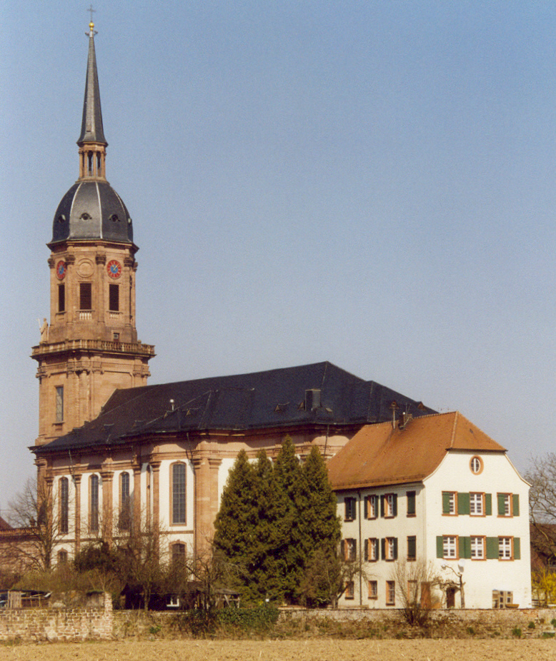 Schutterns ehemalige Klosterkirche, jetzt Pfarrkirche Mariae Himmelfahrt. Ein vortreffliches Werk des Barockstiles (18. Jahrhundert). Ihm zur Seite ein Ãœberrest des klÃ¶sterlichen Konventbaus (als Pfarrhaus genutzt).